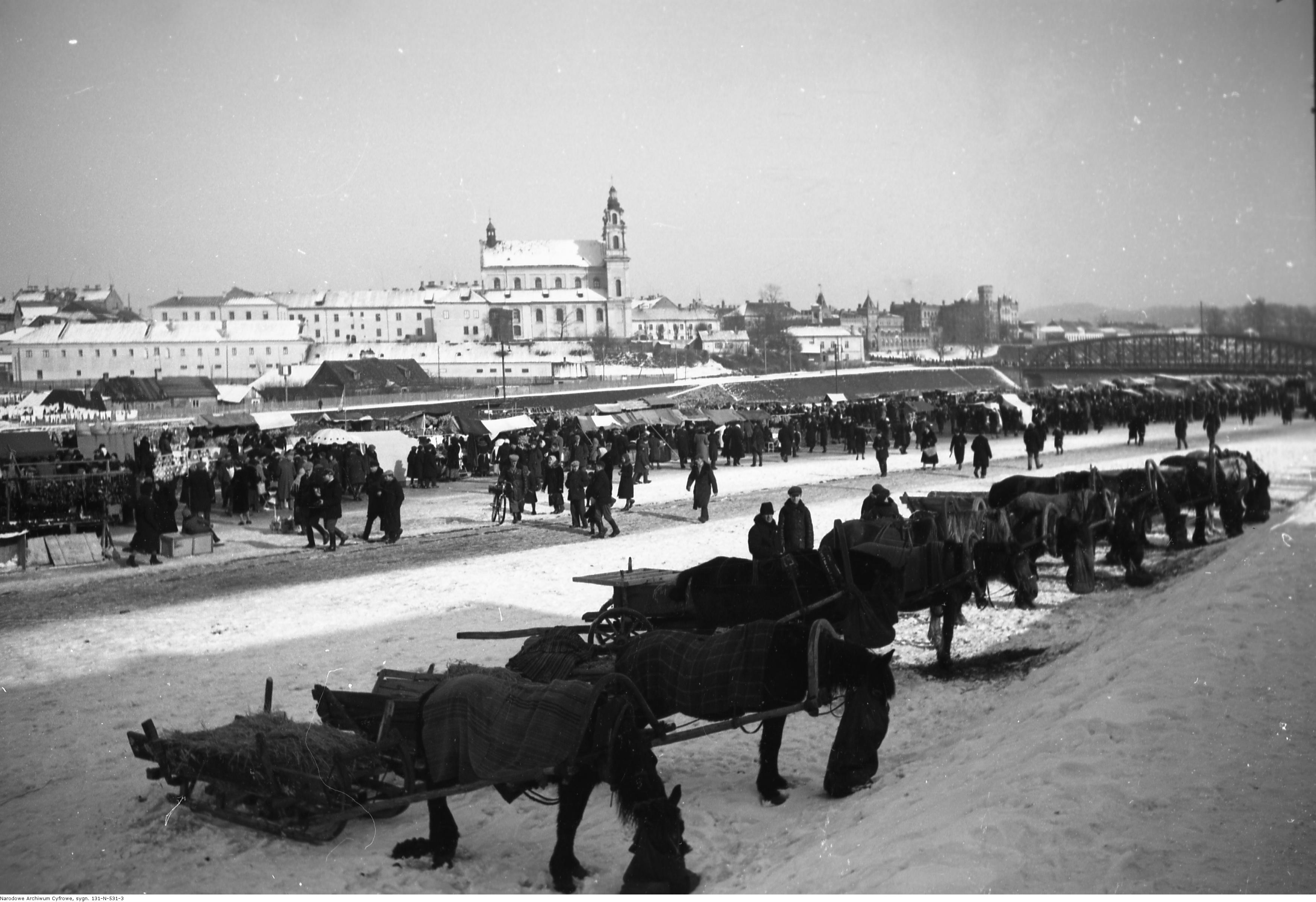 Kaziuki.